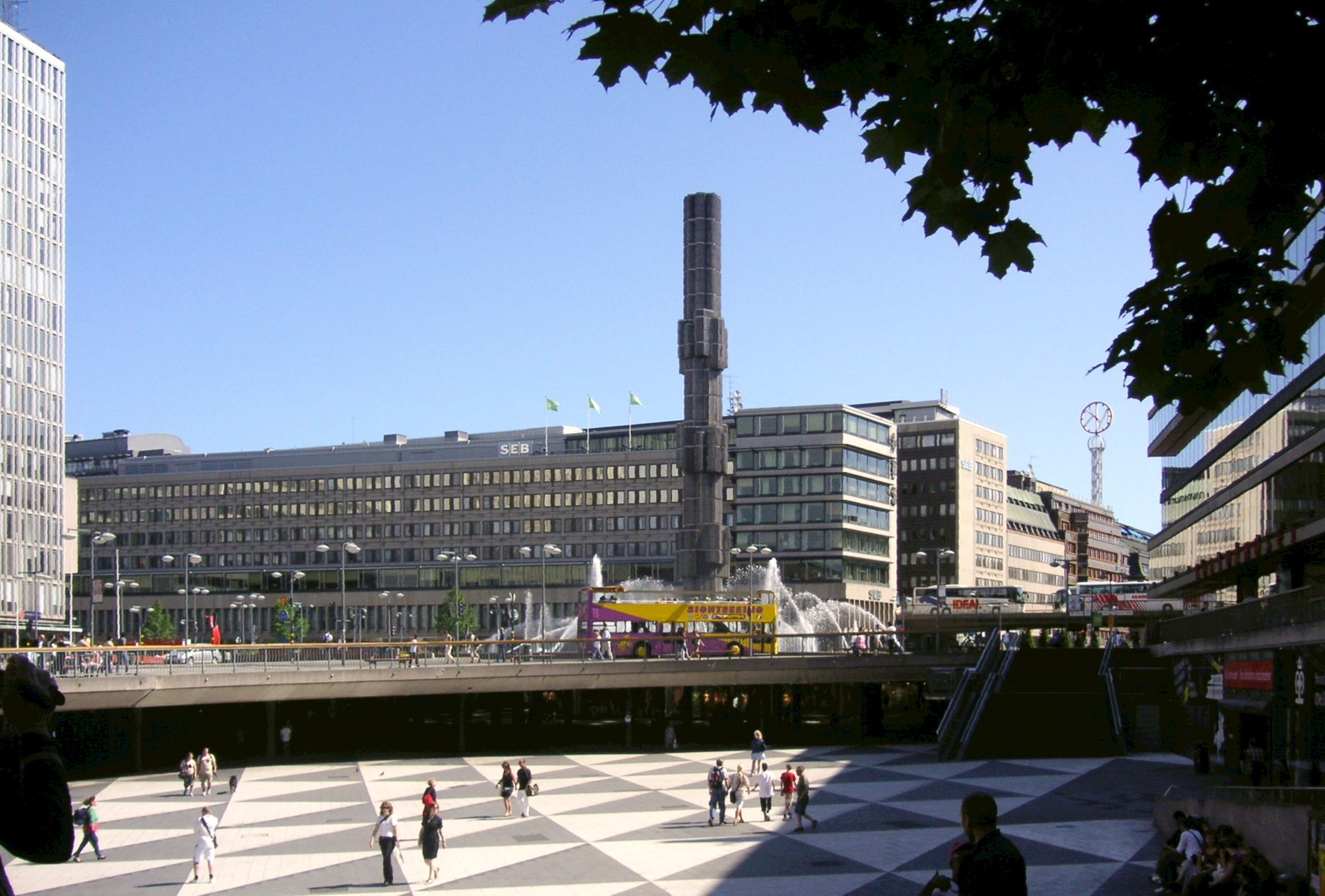 Sergelstorg i Stockholm med "plattan" sommaren 2008